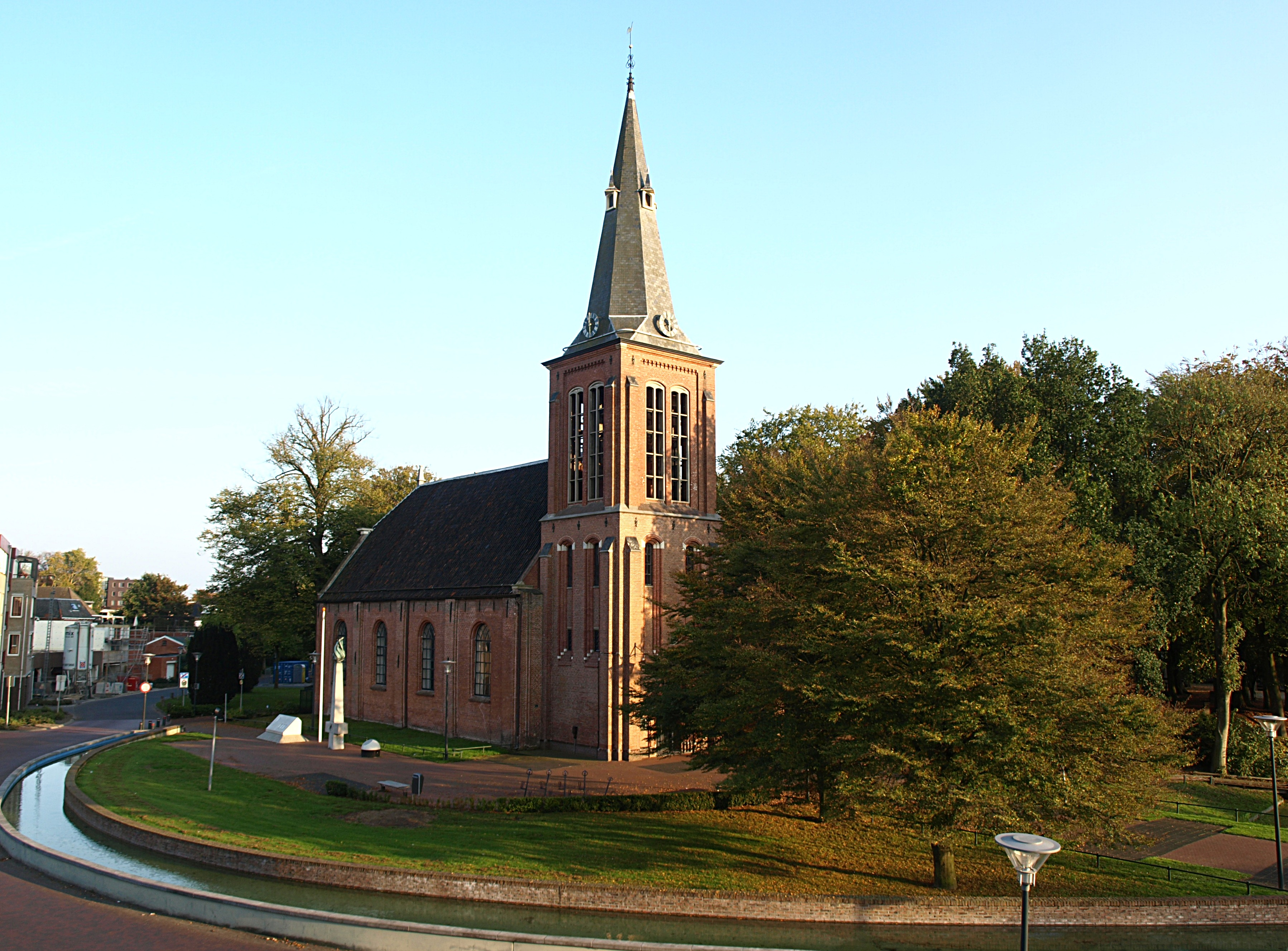 Hervormde kerk in Veendam in de avondzon.